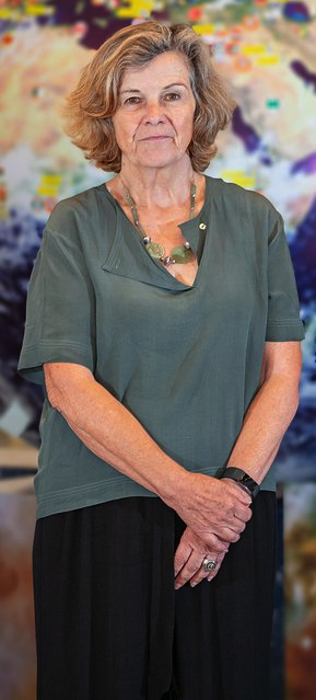 Teresa Lago